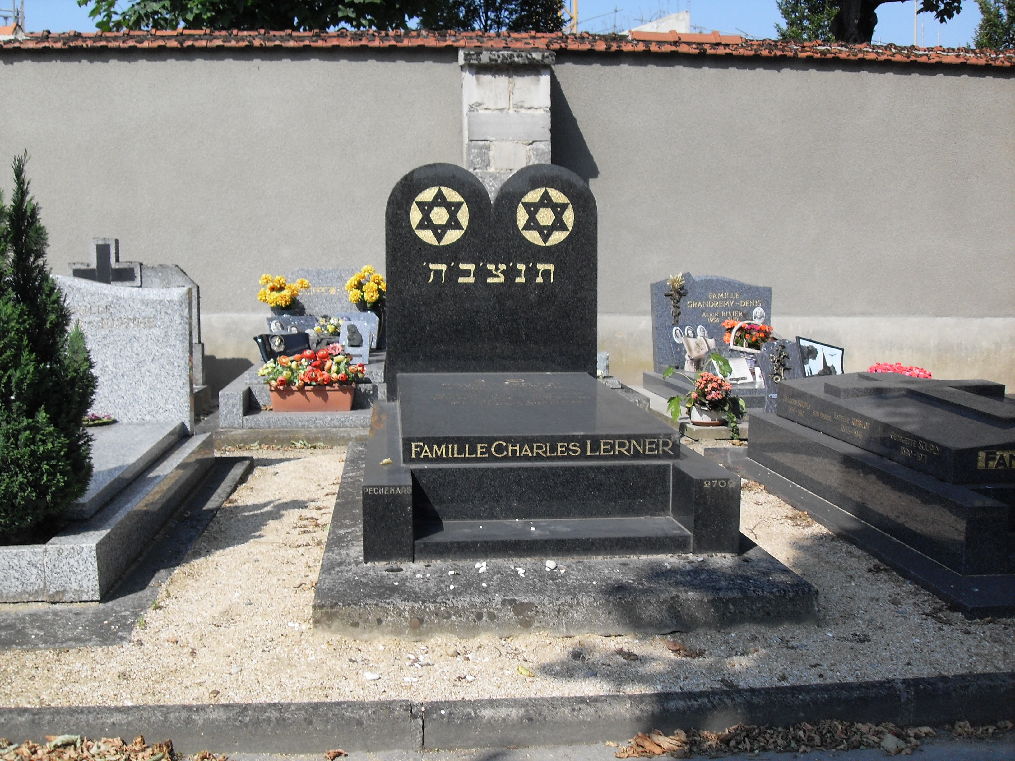 France, Reims, Marne (51) - tombe israélite dans le cimetière de l'est.